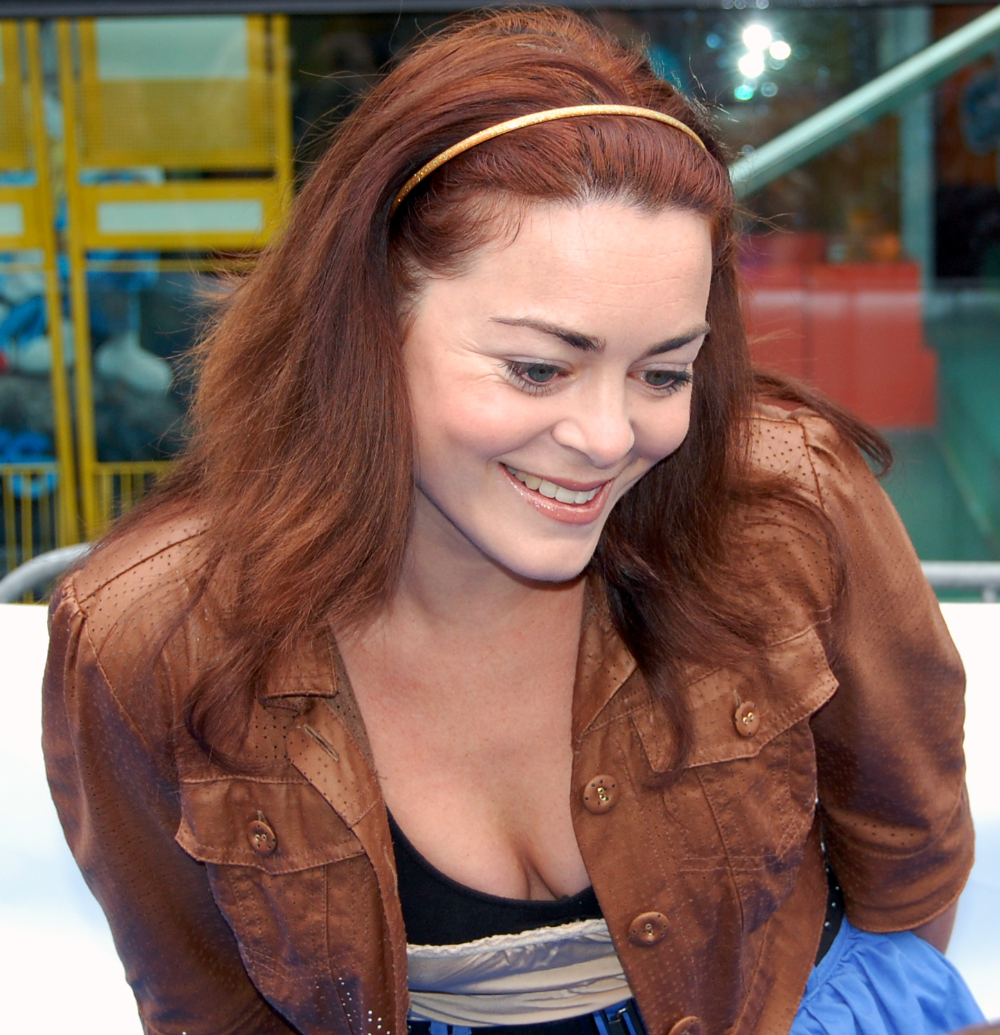 Kim-Lian van der Meij (Beverwijk, 1 oktober 1980) is een Nederlandse zangeres, actrice, televisiepresentatrice, musicalster en danseres.